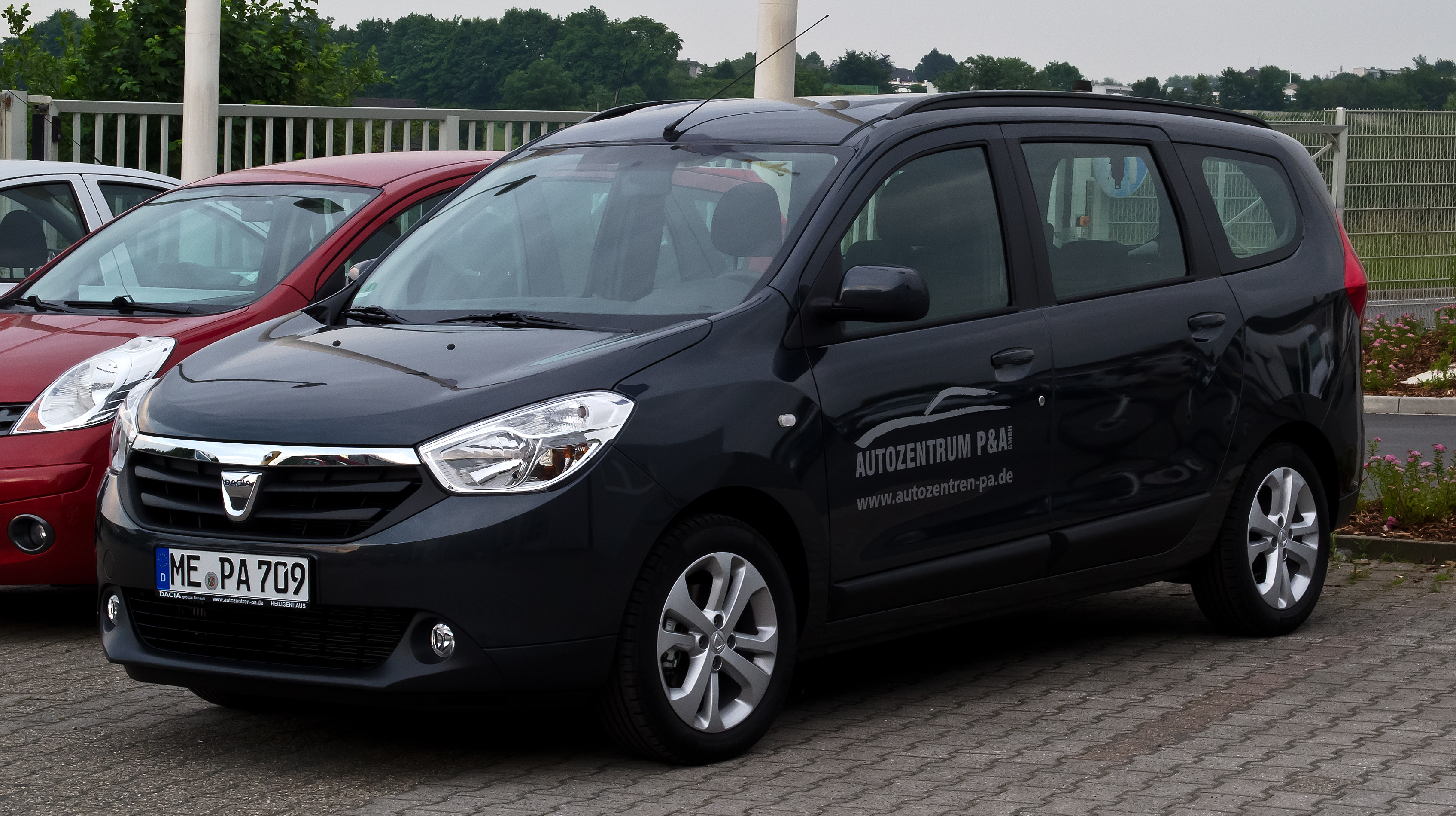 Dacia Lodgy dCi 110 eco² Prestige